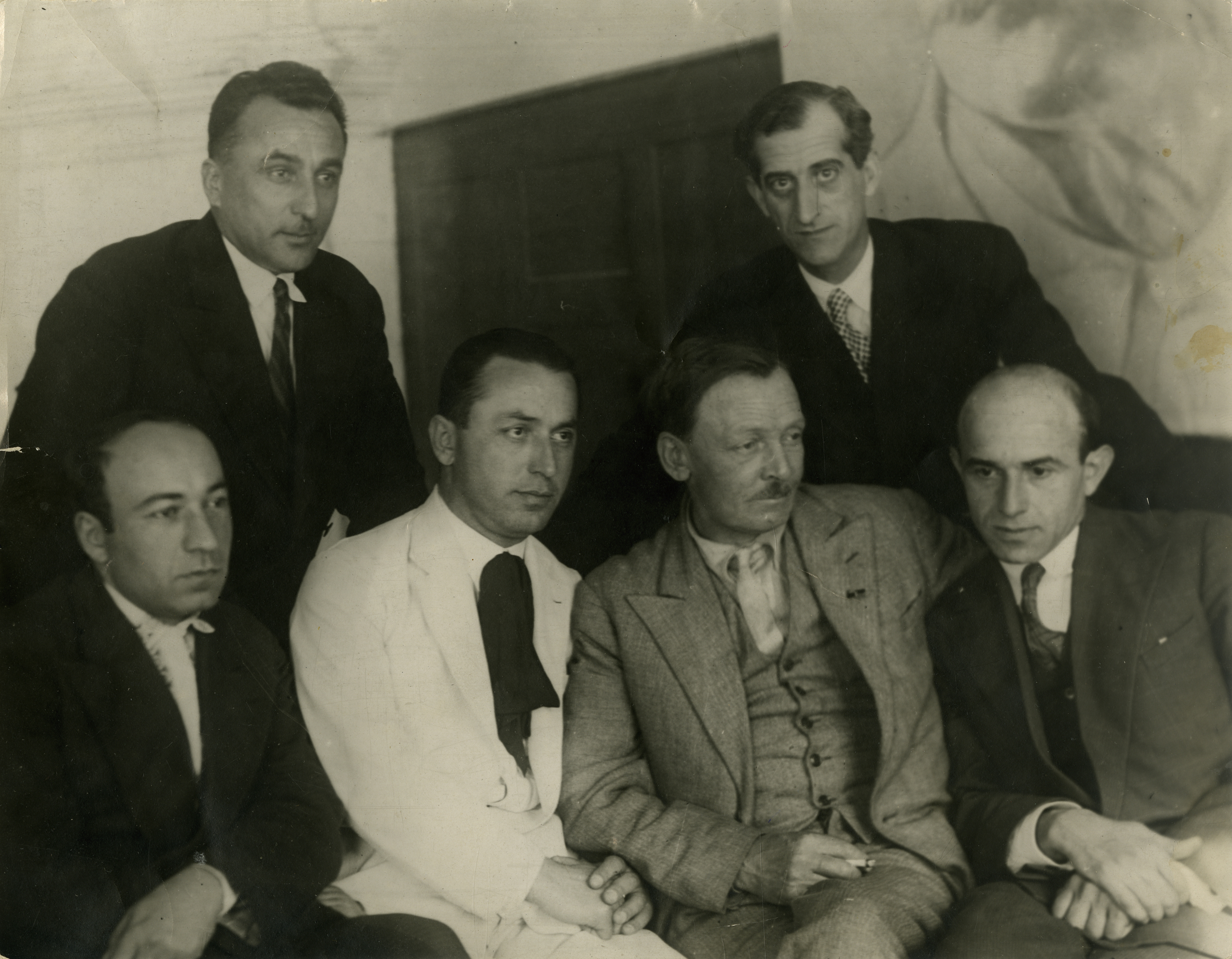 Сидят: Бенито Буачидзе, Ражден Гветадзе, ?, Константин Лорткипанидзе Стоят: Ило Мосашвили, Александр Кутатели